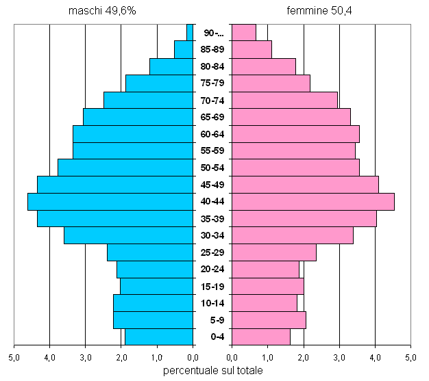 Popolazione per età e sesso a Mogliano Veneto (ISTAT, 1-1-2007).